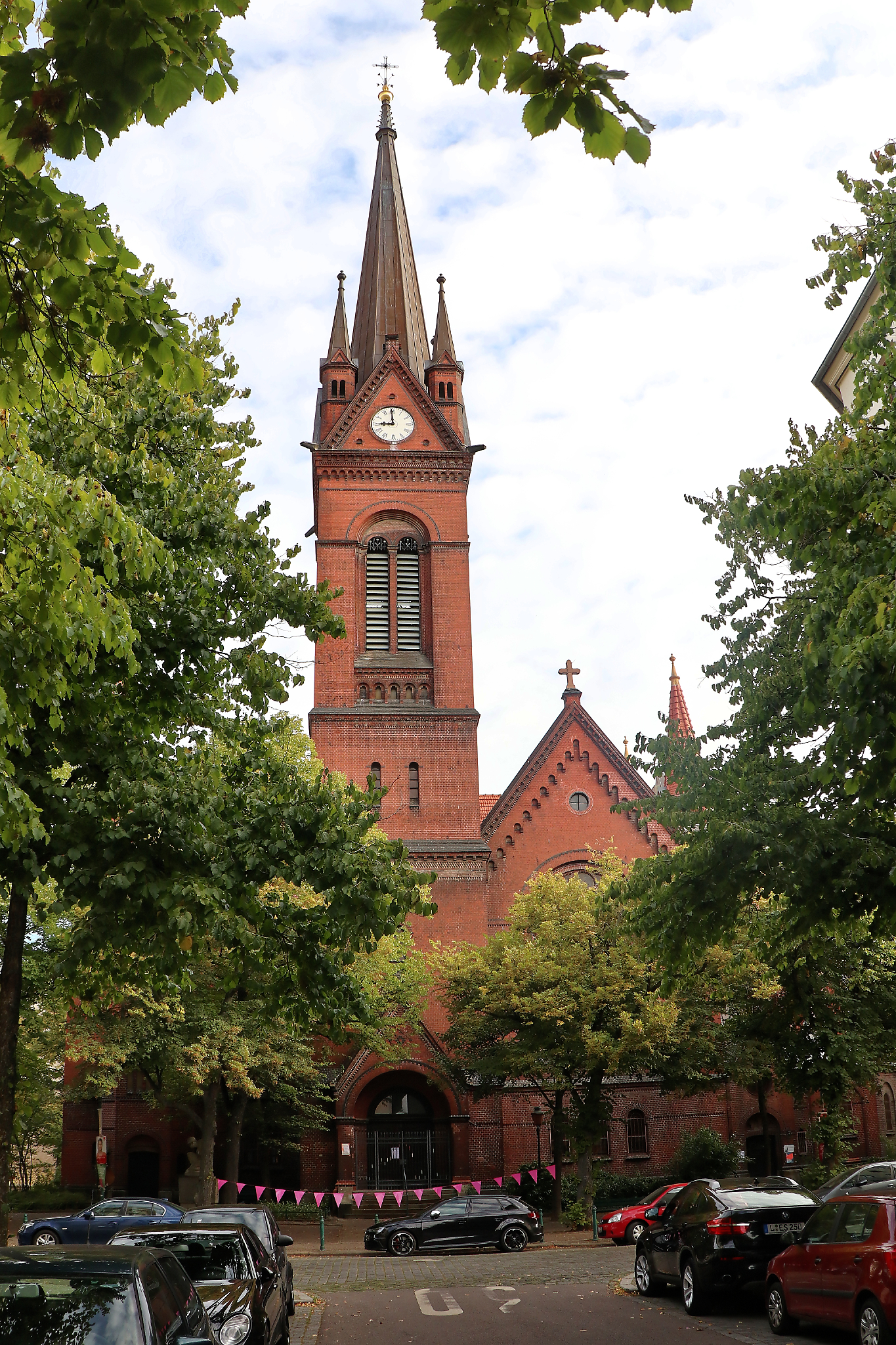 Ev.-Luth. Kirche "Zum Hl. Kreuz in Leipzig, Pfarrkirche für Leipzig-Neuswtadt/Neuschönefeld, eingeweiht am 31. Okt. 1894, Architekt: Paul Lange (1853 - 1932)